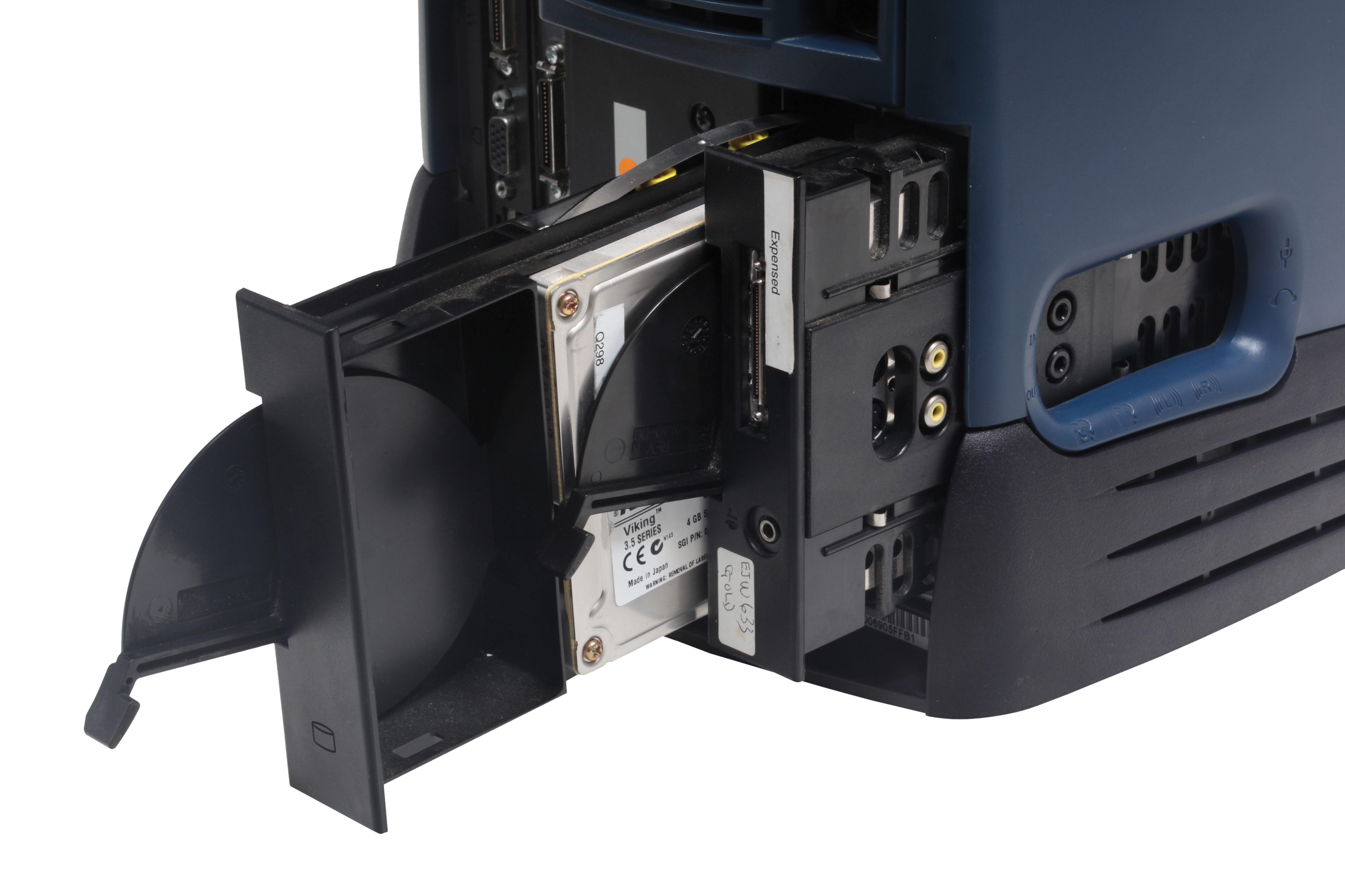 User:Rama/Bolo/SGI O2